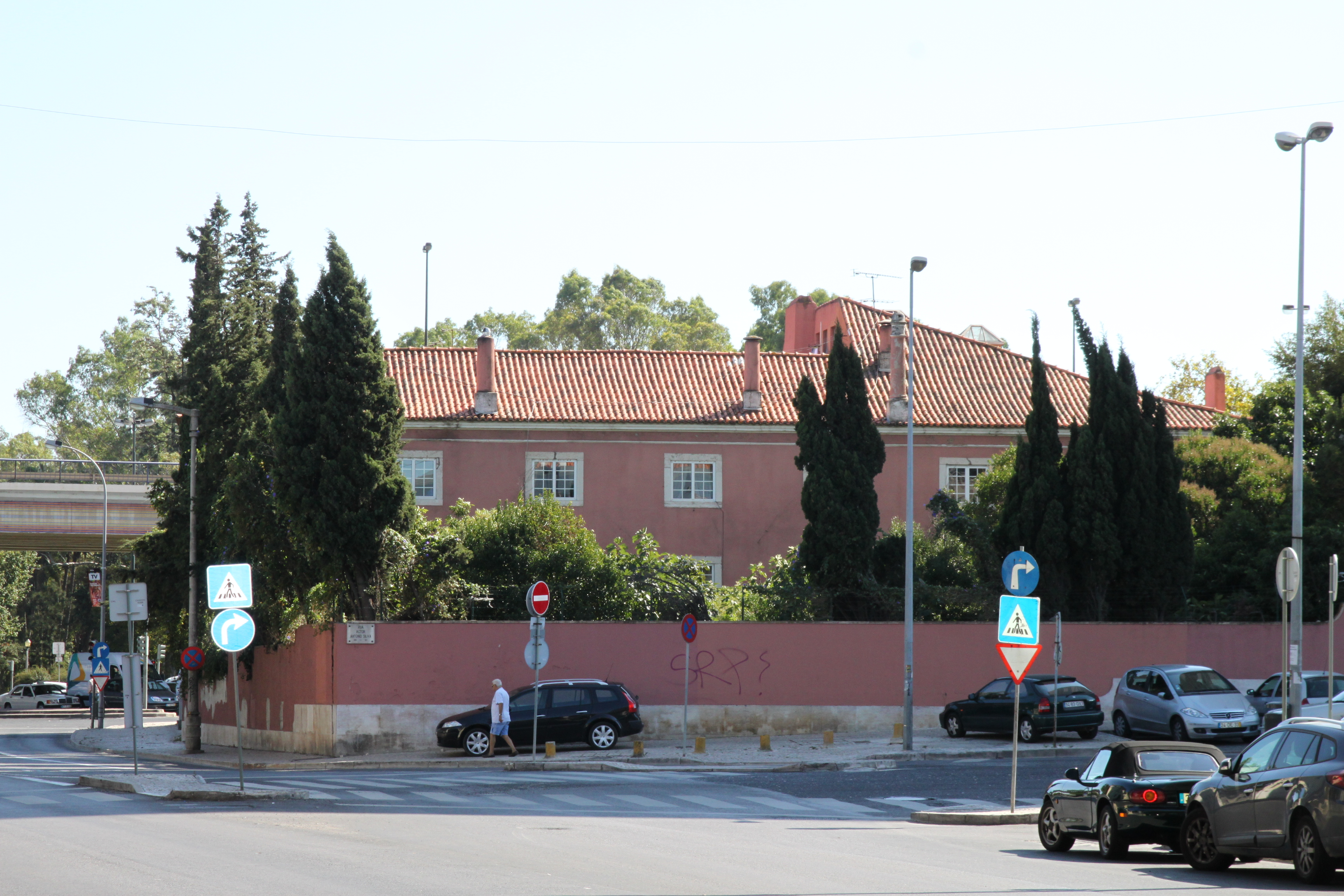 Palácio do Conde de Vimioso This file was uploaded for Wiki Loves Monuments in Portugal with the unique identifier 70417.